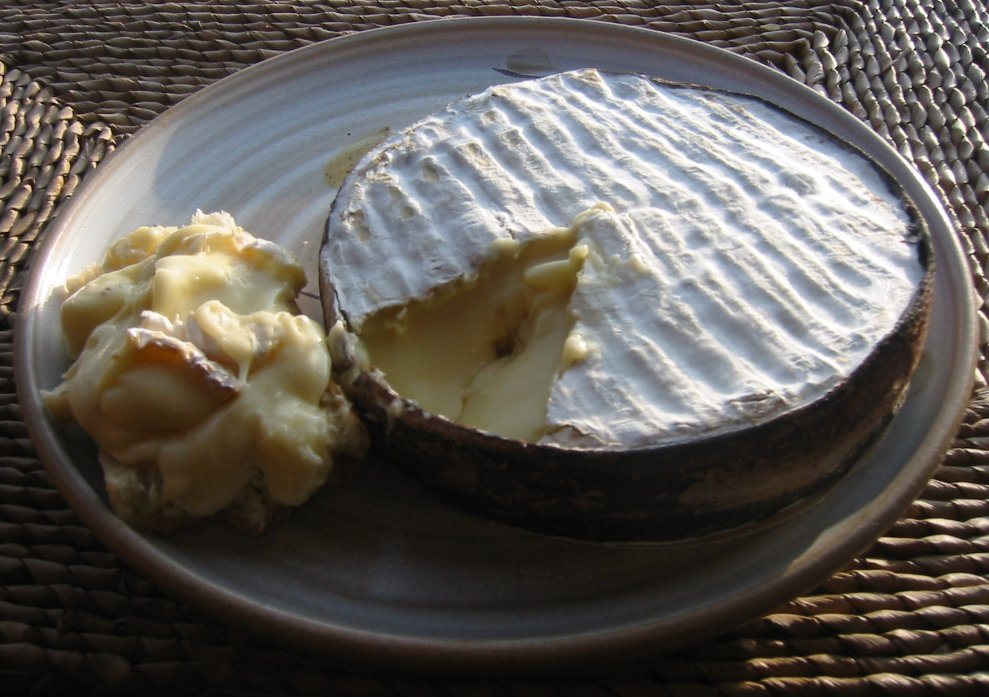 Edel de Cleron - Fromage de la gastronomie Franc Comtoise